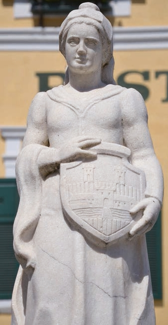 Die 1952 von Hellmuth Marx geschaffene Figur am Oberdrauburger Marktbrunnen. Sie stellt eine Bürgerfrau in Tracht mit Goldhaube dar und hält das Oberdrauburger Wappen.